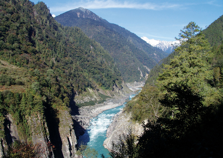 西藏林芝-雅鲁藏布